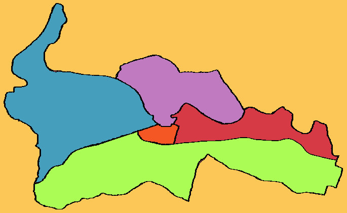 Mapa de los distritos de la ciudad de logroño